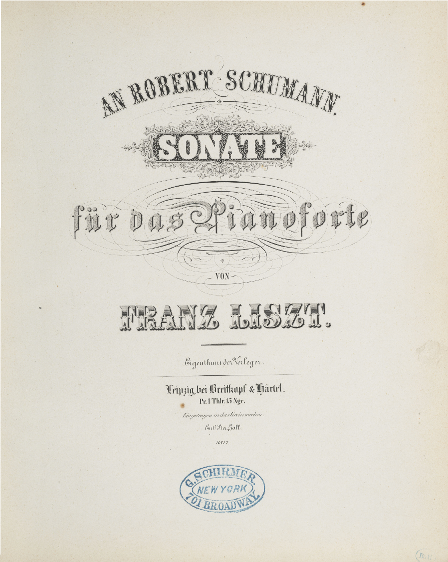 Page de garde d'une édition de 1854 de la sonate en SI mineur de Liszt